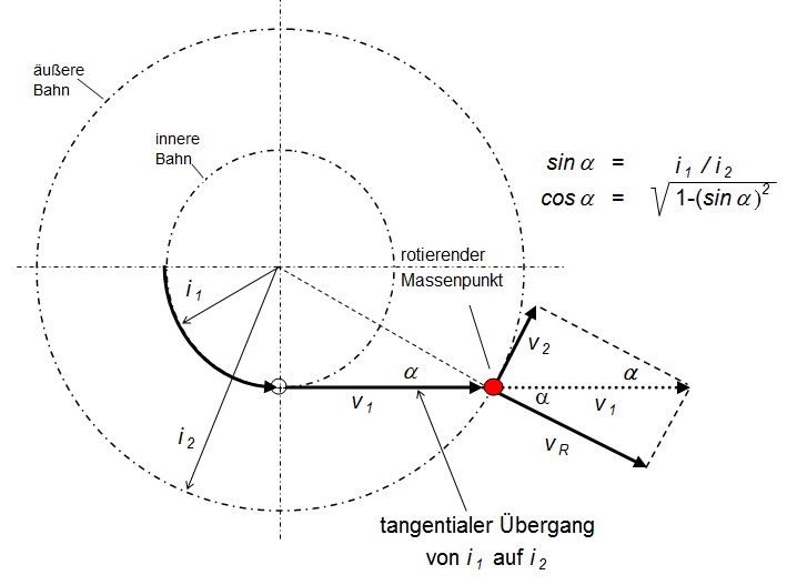 Trigonometrische Berechnung der Energiedifferenz zwischen zwei Trägheitsradien